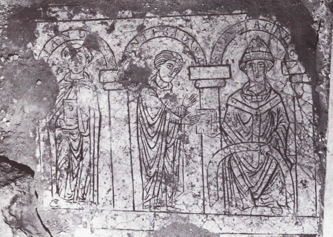 Ausschnitt aus der Archäologischen Grabung in der Kirche von Kloster Benediktbeuern